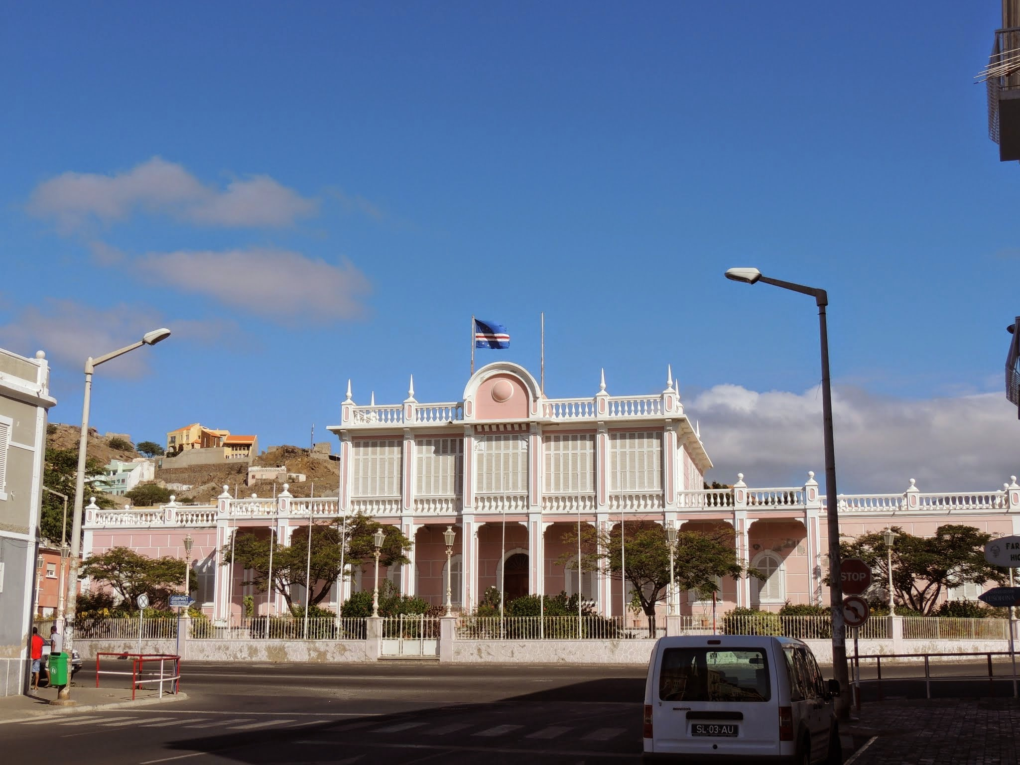 le palais du gouverneur à Mindelo (Cap-Vert)